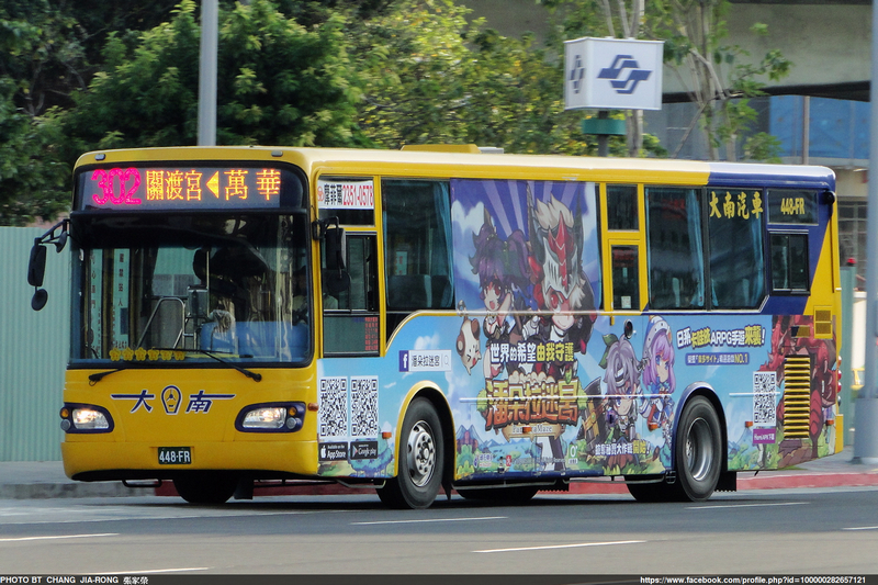 HINO - RK8JRSA - 448-FR